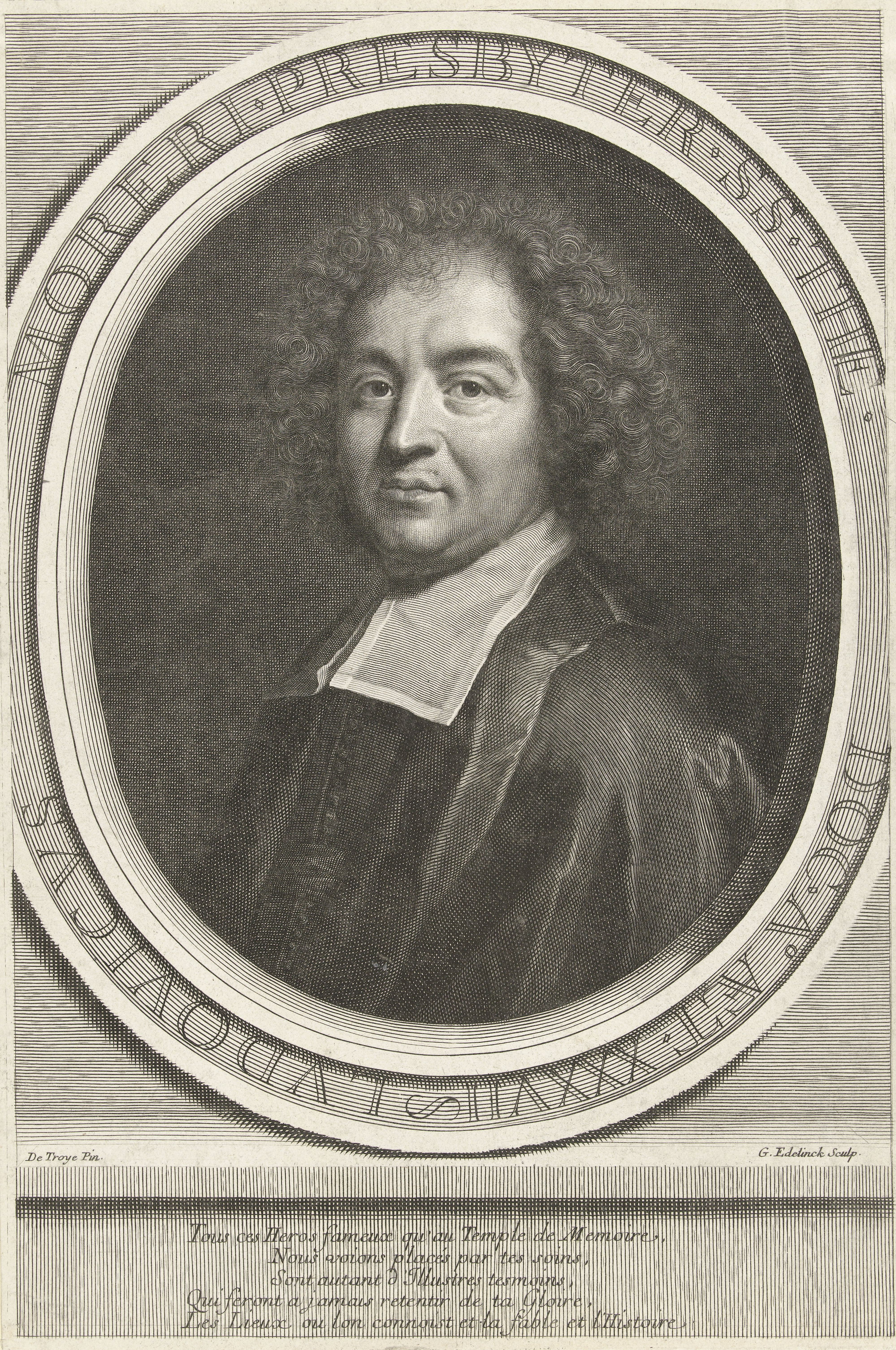 IdentificatieTitel(s): Portret van Louis MoreriObjecttype: prent Objectnummer: RP-P-BI-7563Catalogusreferentie: Robert-Dumesnil 280-2(2)Opschriften / Merken: verzamelaarsmerk, verso, gestempeld: Lugt 2228Omschrijving: Portret van de Franse geleerde en encyclopedist Louis Moreri (1643-1680), afgebeeld in ovale omlijsting met Latijnse tekst. Onder de lijst een Frans vers in vijf regels.VervaardigingVervaardiger: prentmaker: Gerard Edelinck (vermeld op object)naar schilderij van: François de Troy (vermeld op object)naar schilderij van: Jean François de Troy (vermeld op object)Plaats vervaardiging: prentmaker: Parijsnaar schilderij van: Frankrijknaar schilderij van: FrankrijkDatering: 1666 - 1707Fysieke kenmerken: gravureMateriaal: papier Techniek: graveren (drukprocedé)Afmetingen: blad: h 323 mm × b 217 mmOnderwerpWie: Louis MoreriVerwerving en rechtenVerwerving: onbekendCopyright: Publiek domein